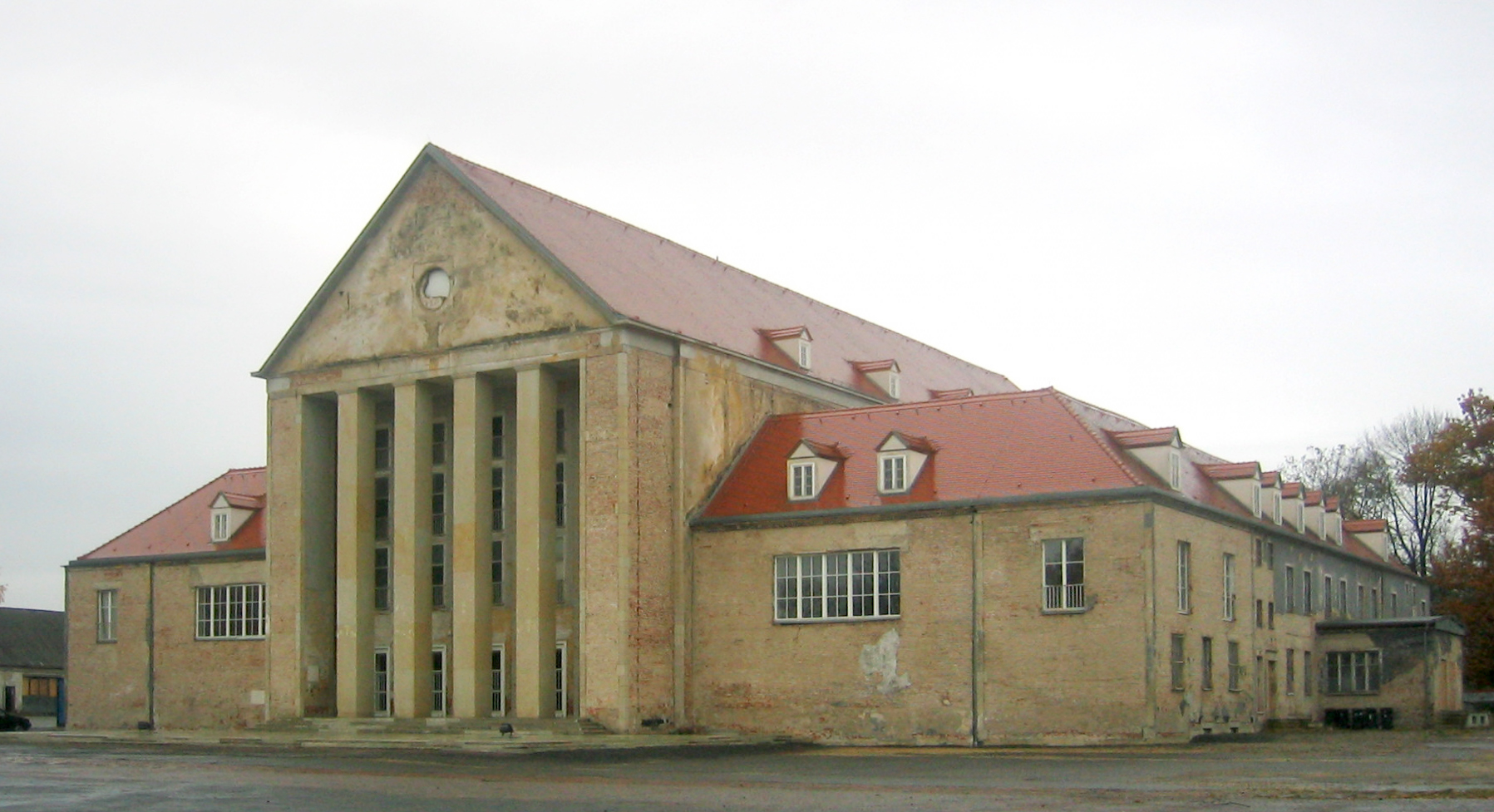 Dresden, Germany: Festspielhaus Hellerau